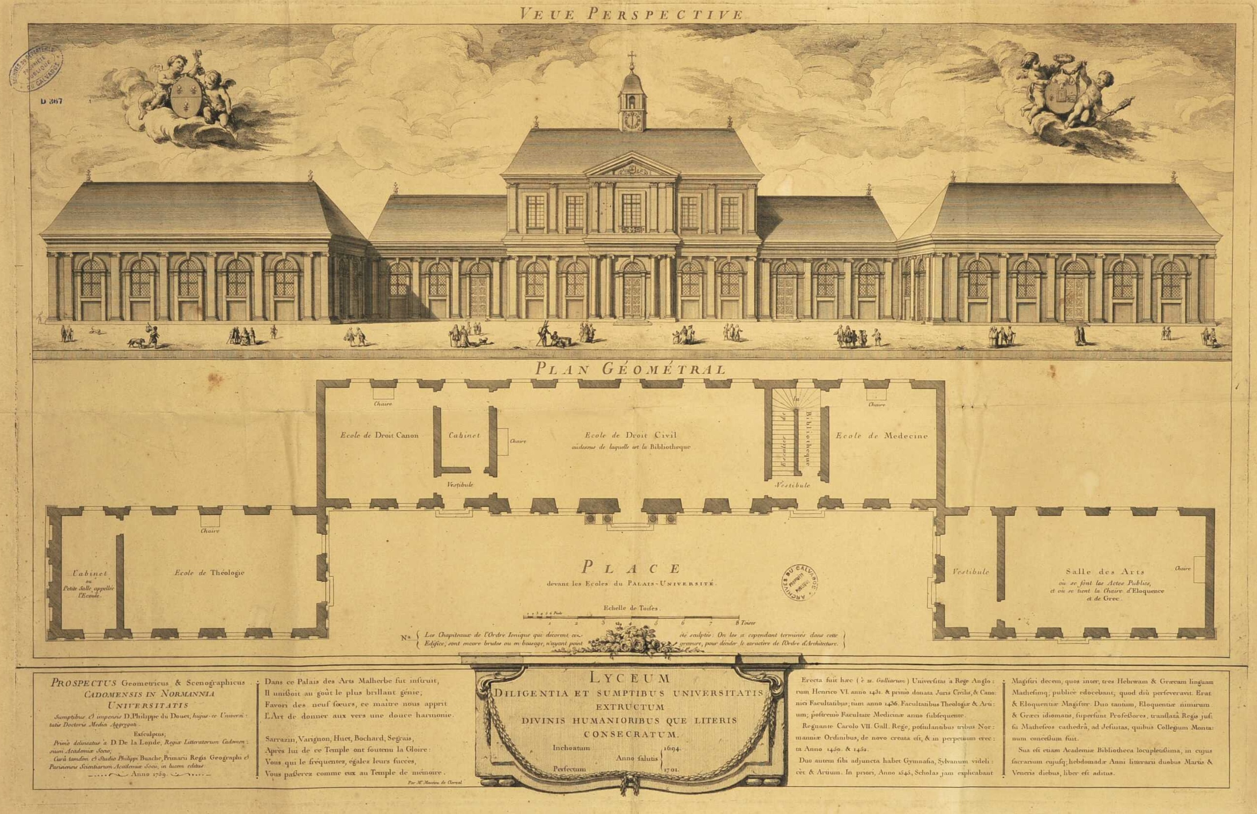 Plan de l'université de Caen entre 1701 et 1875